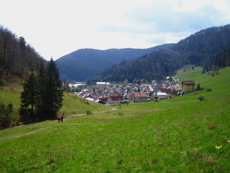 View on Dedinky Village, Slovak Paradise, Slovakia